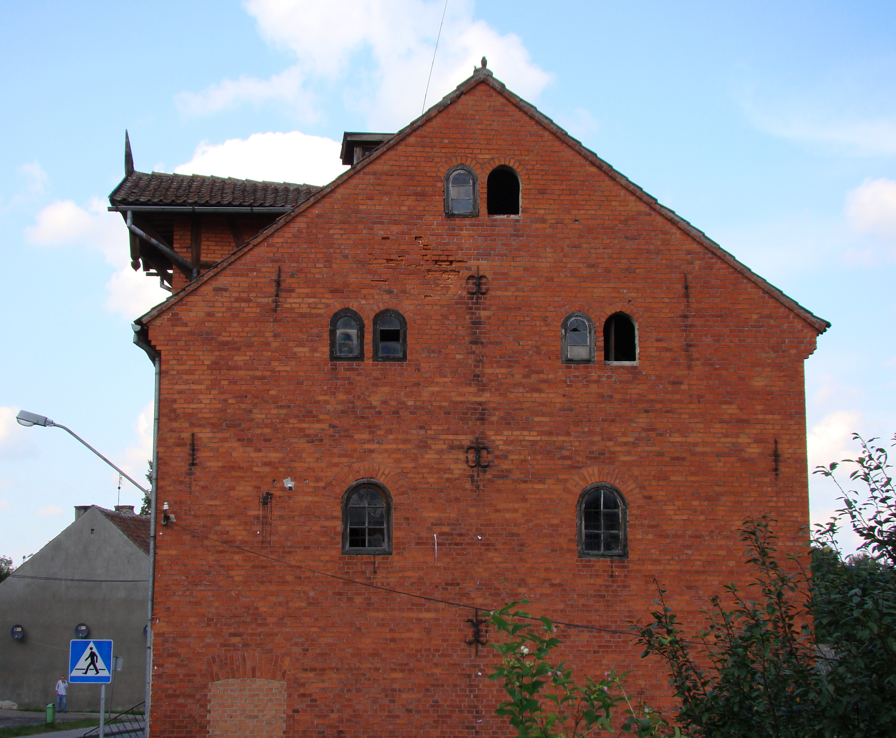 Dobre Miasto, ul. Łużycka 37 - spichlerz